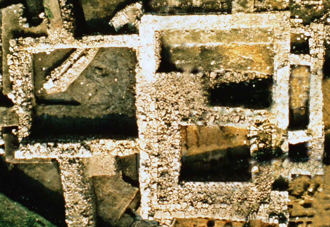 Ausgrabung Herrensitz Düna der Fundamente des Steingebäudes von oben, Laufstege nachträglich rausretuschiert